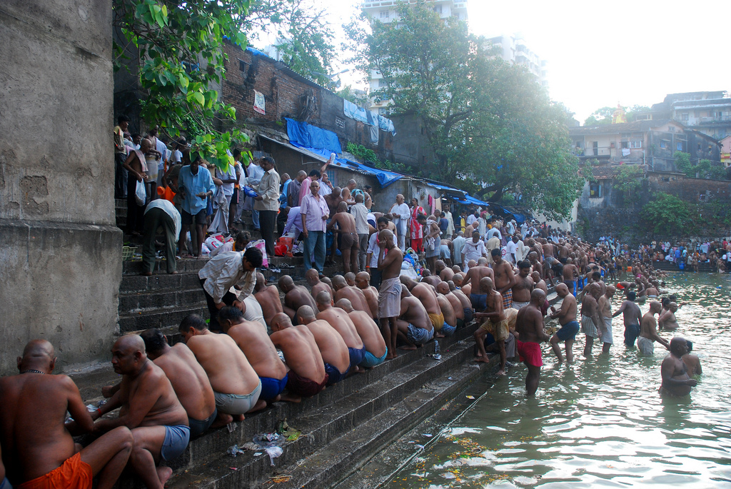 Pitru Paksha at Banganga Tank, Mumbai, India